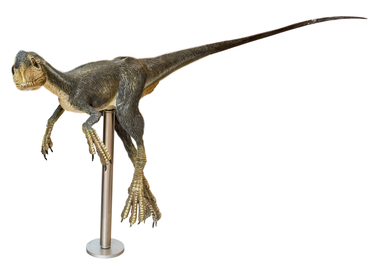 Ricostruzione in scala 1:1.